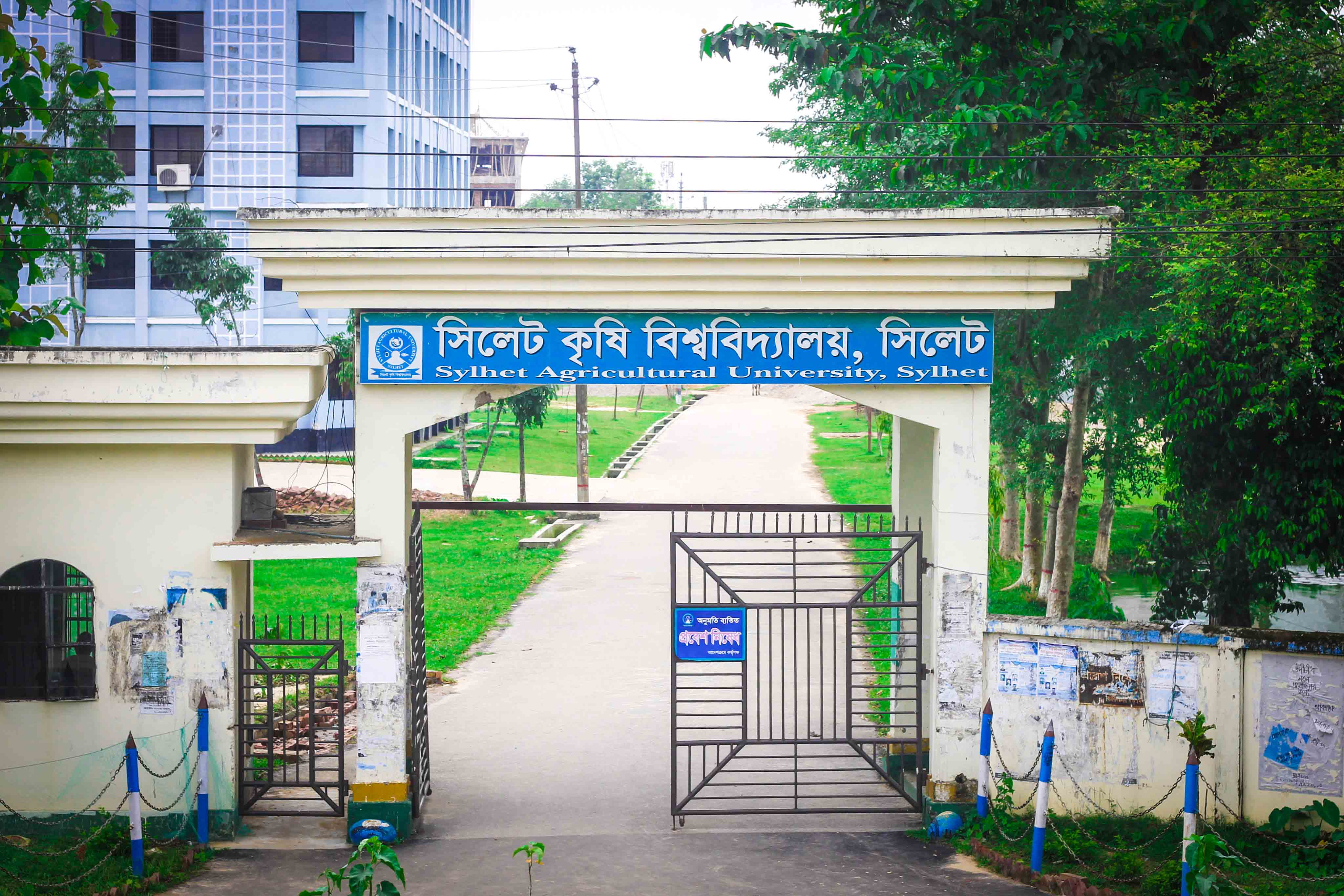 সিলেট কৃষি বিশ্ববিদ্যালয়ের প্রধান গেট।